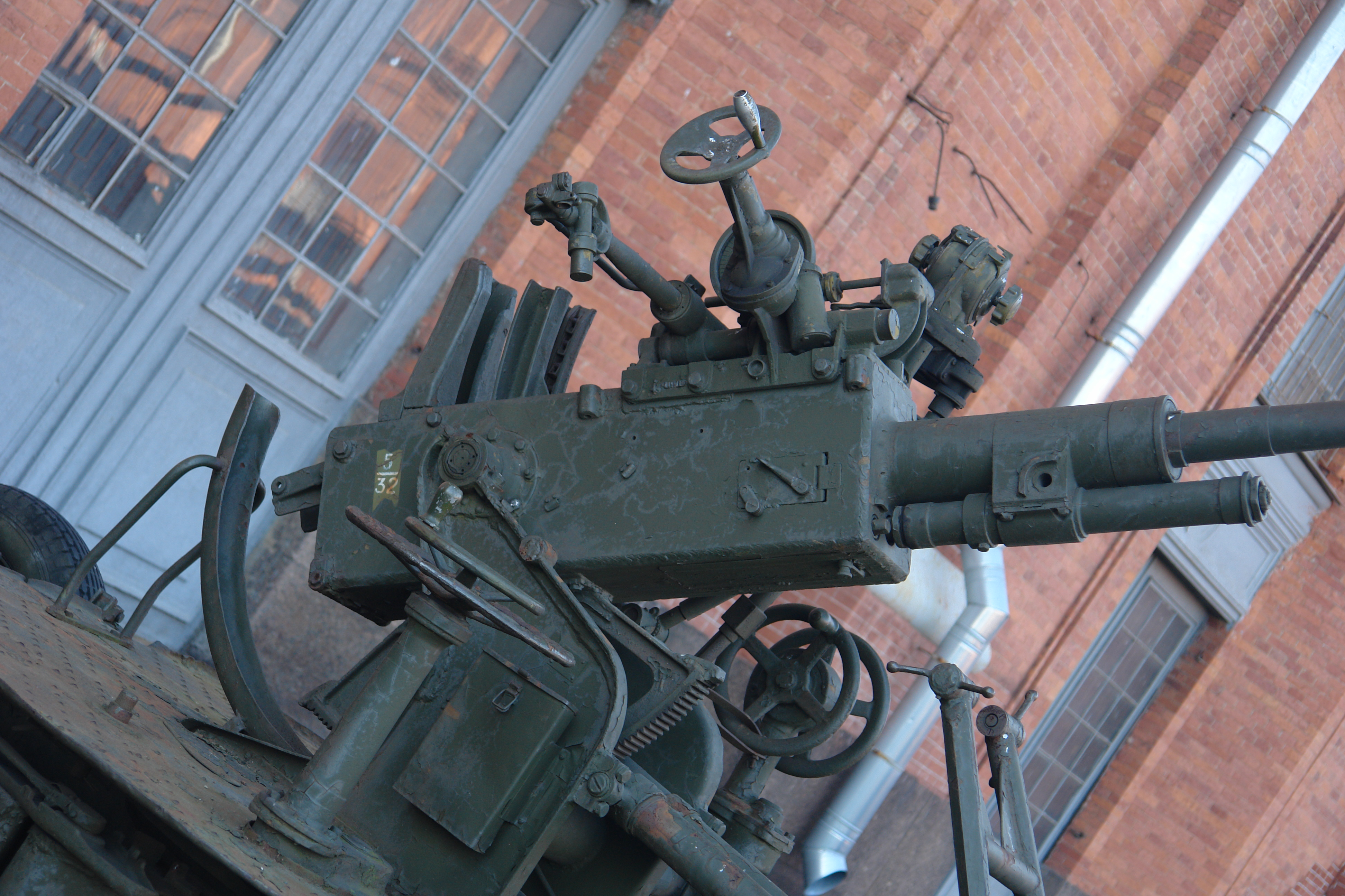 37-мм автоматическая зенитная пушка обр. 1939 г. Главный конструктор М.Н. Логинов. Досягаемость стрельбы, м: 1 по высоте - 6700, по дальности - 8500. Скорострельность - 160-180 выстр/мин. Масса, кг: орудия - 2300, снаряда - 0,73. Расчет - 7 человек. Военно-исторический музей артиллерии, инженерных войск и войск связи, Санкт-Петербург.